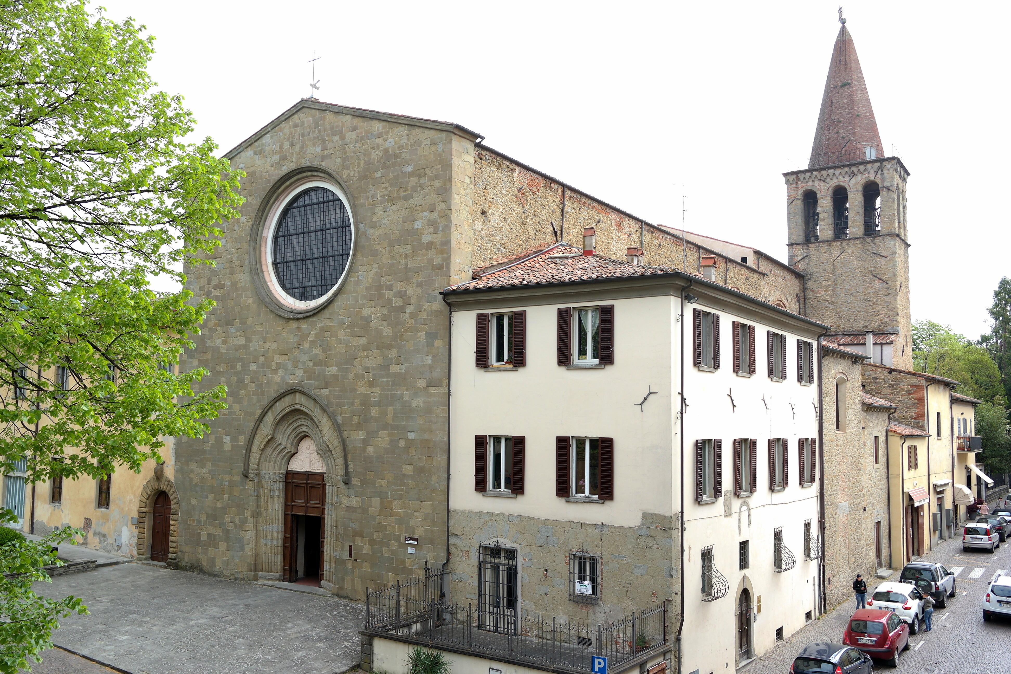 Chiesa di San Francesco a Sansepolcro vista dal terrazzo del museo civico